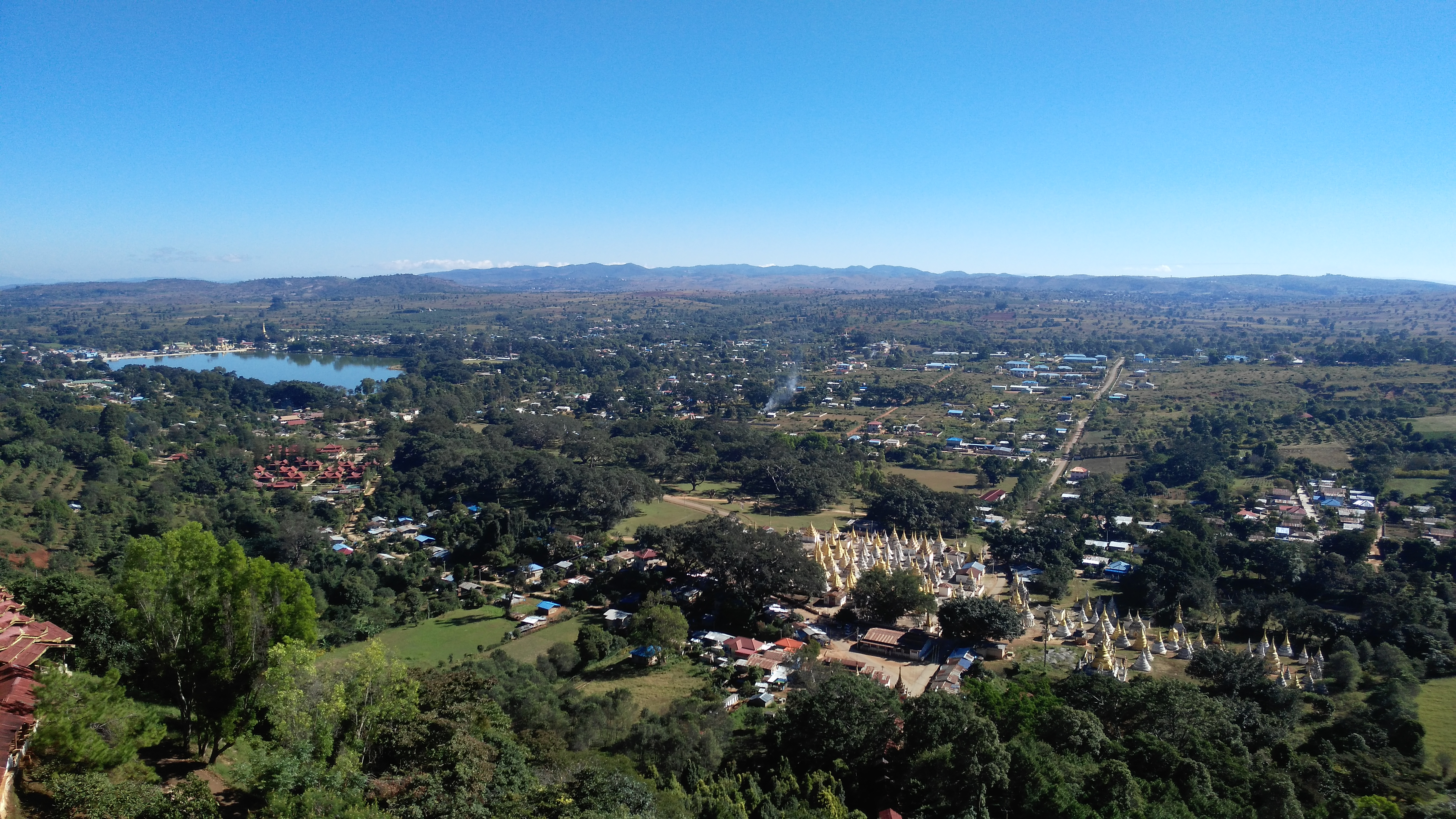 ပုန်းတလုတ်ရေကန်နှင့်ပင်းတယမြို့